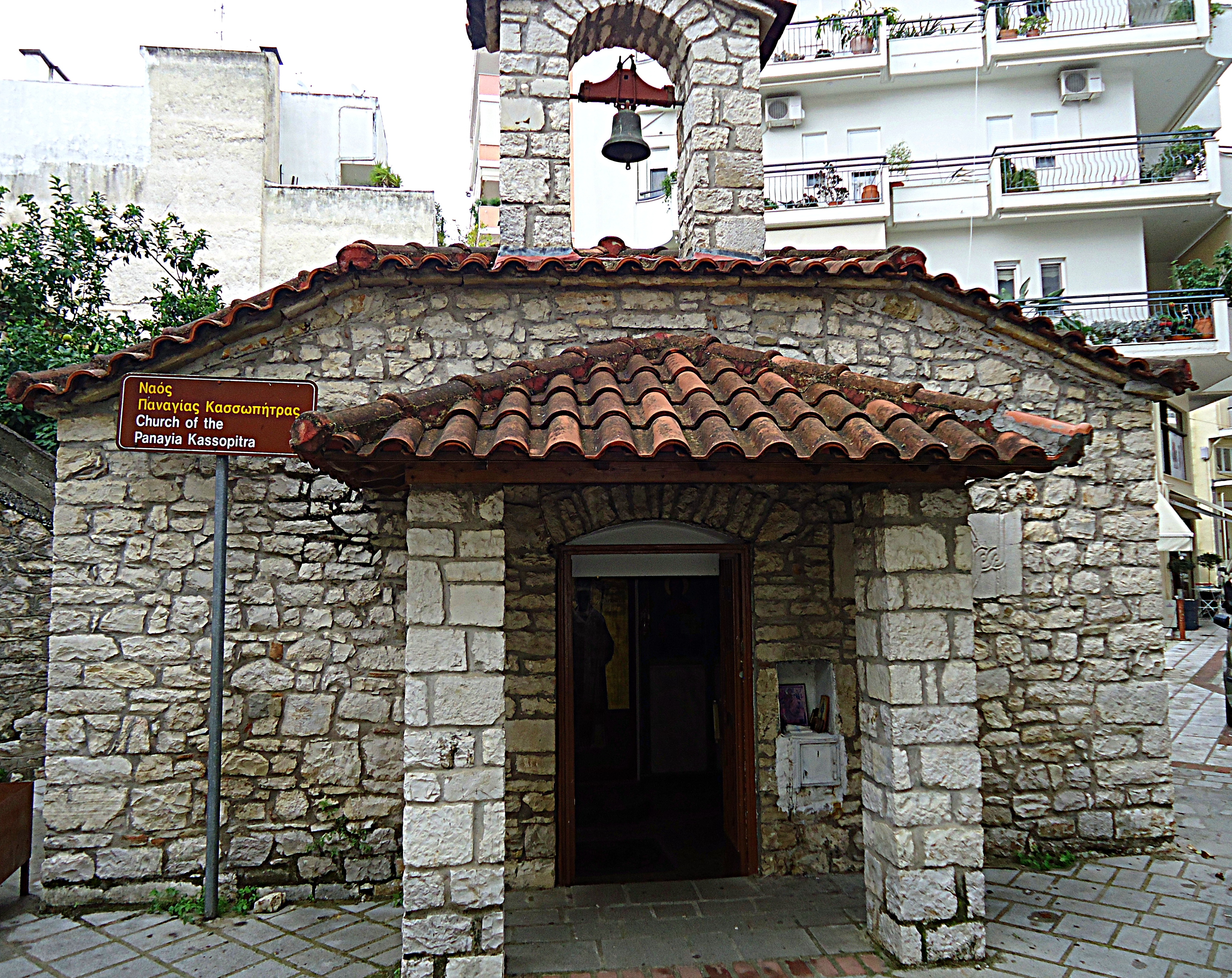 Ο ναός της Παναγίας της Κασσωπίτρας στην Άρτα.